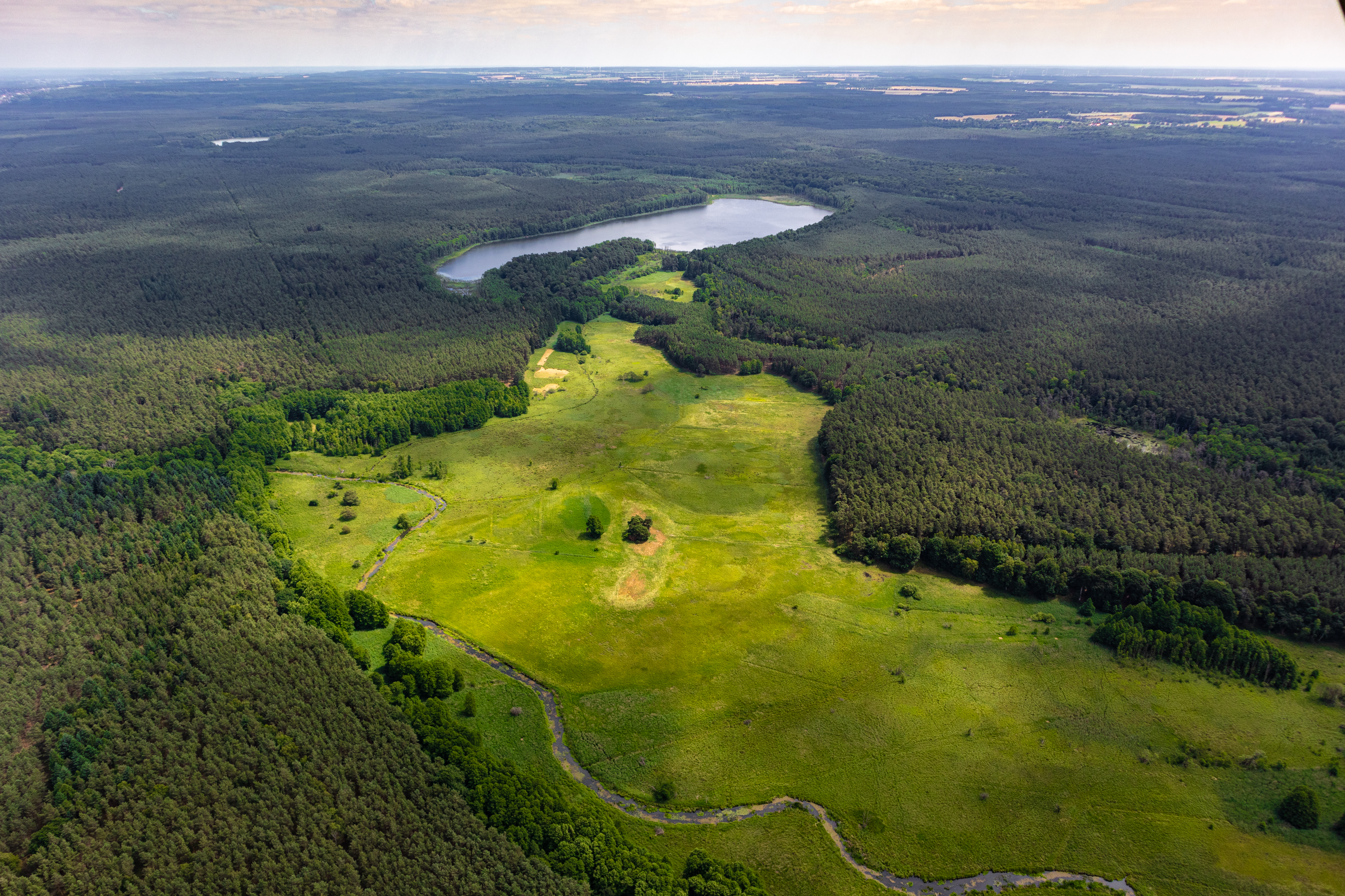 Großer Samithsee bei Finowfurt, Finowfließ